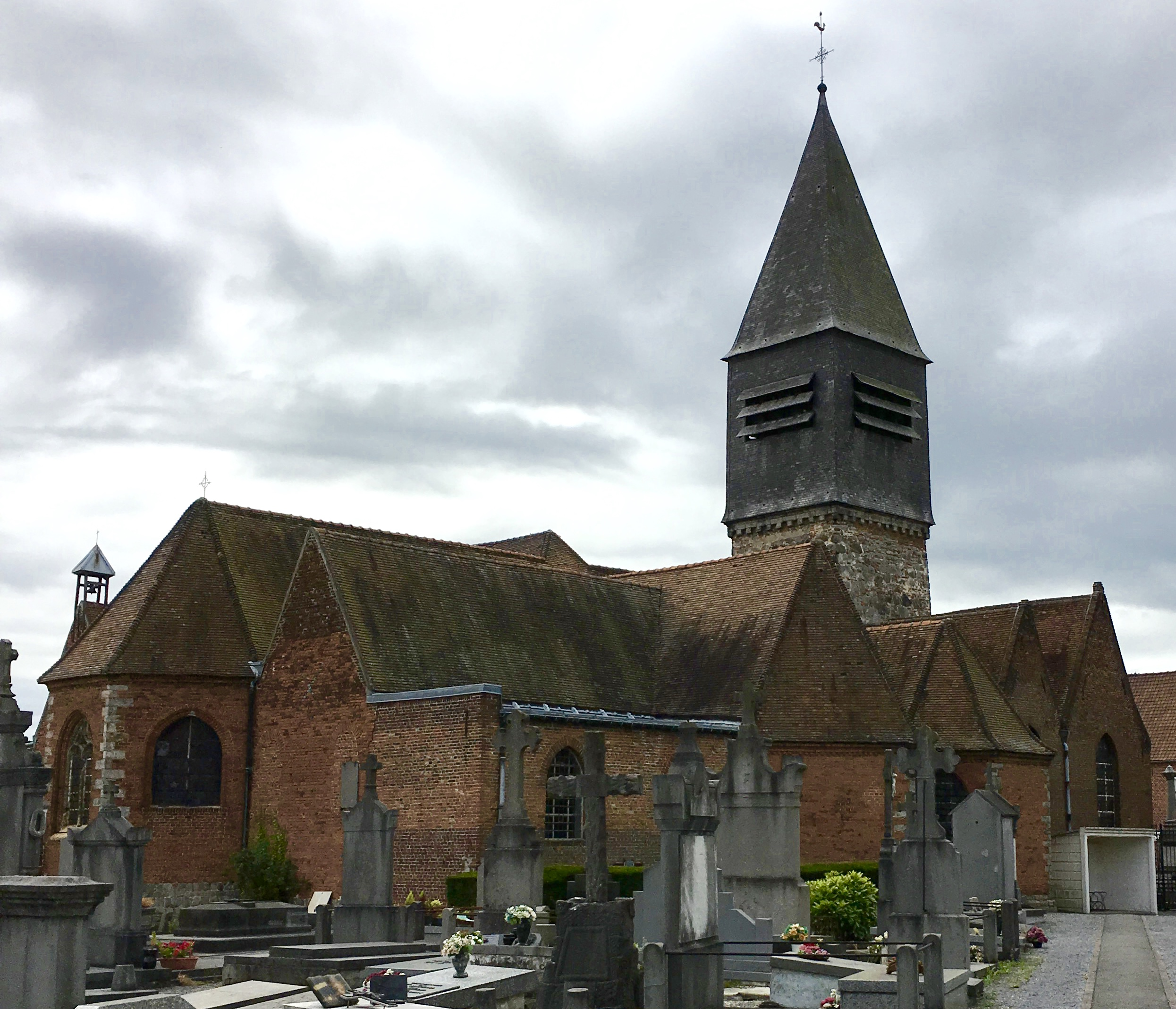 Vue sur l'arrière de l'église Saint-Michel